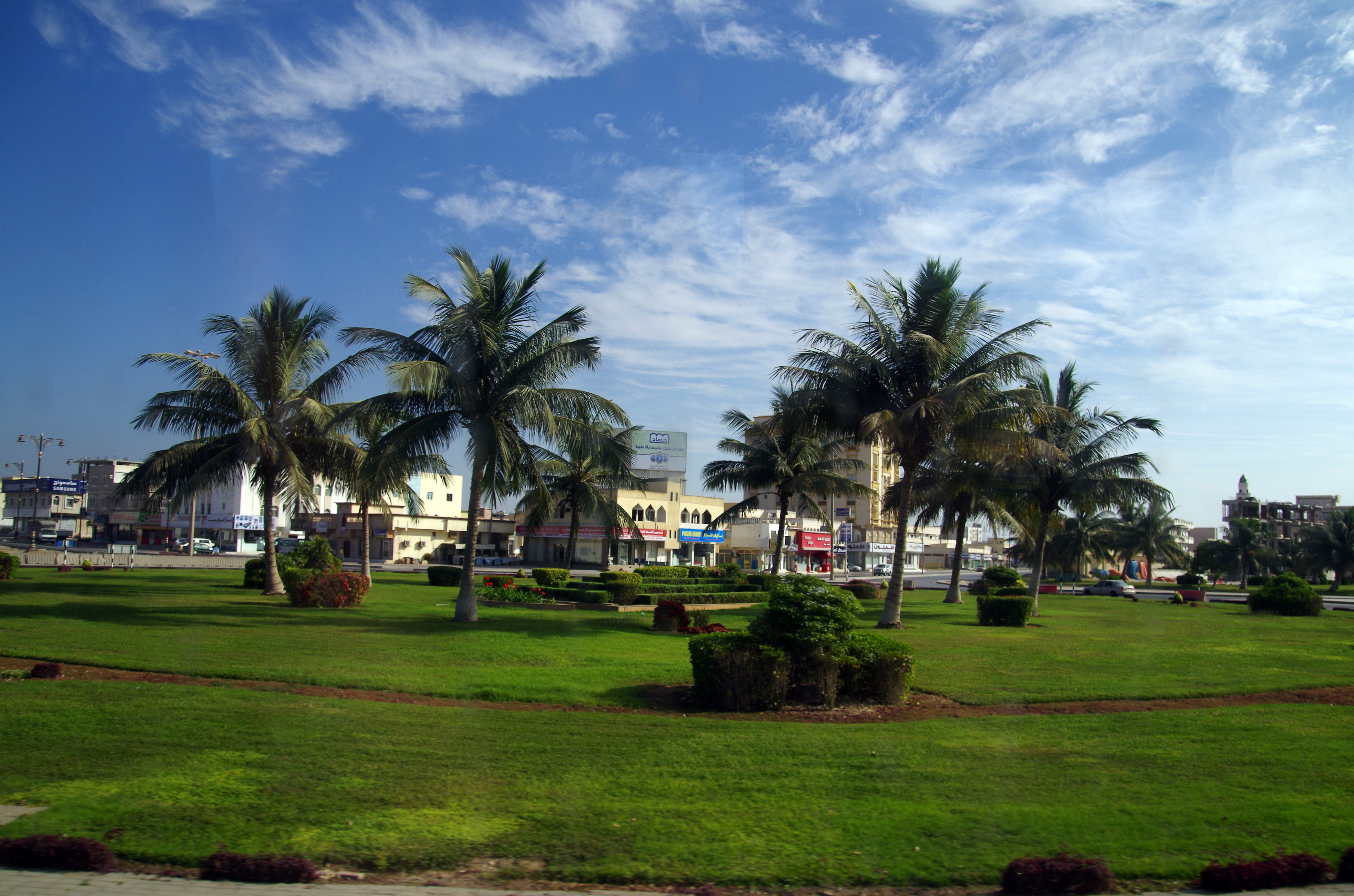 Salalah Eifanhrt vom Hafen